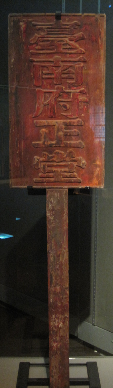 臺南府衙執事牌